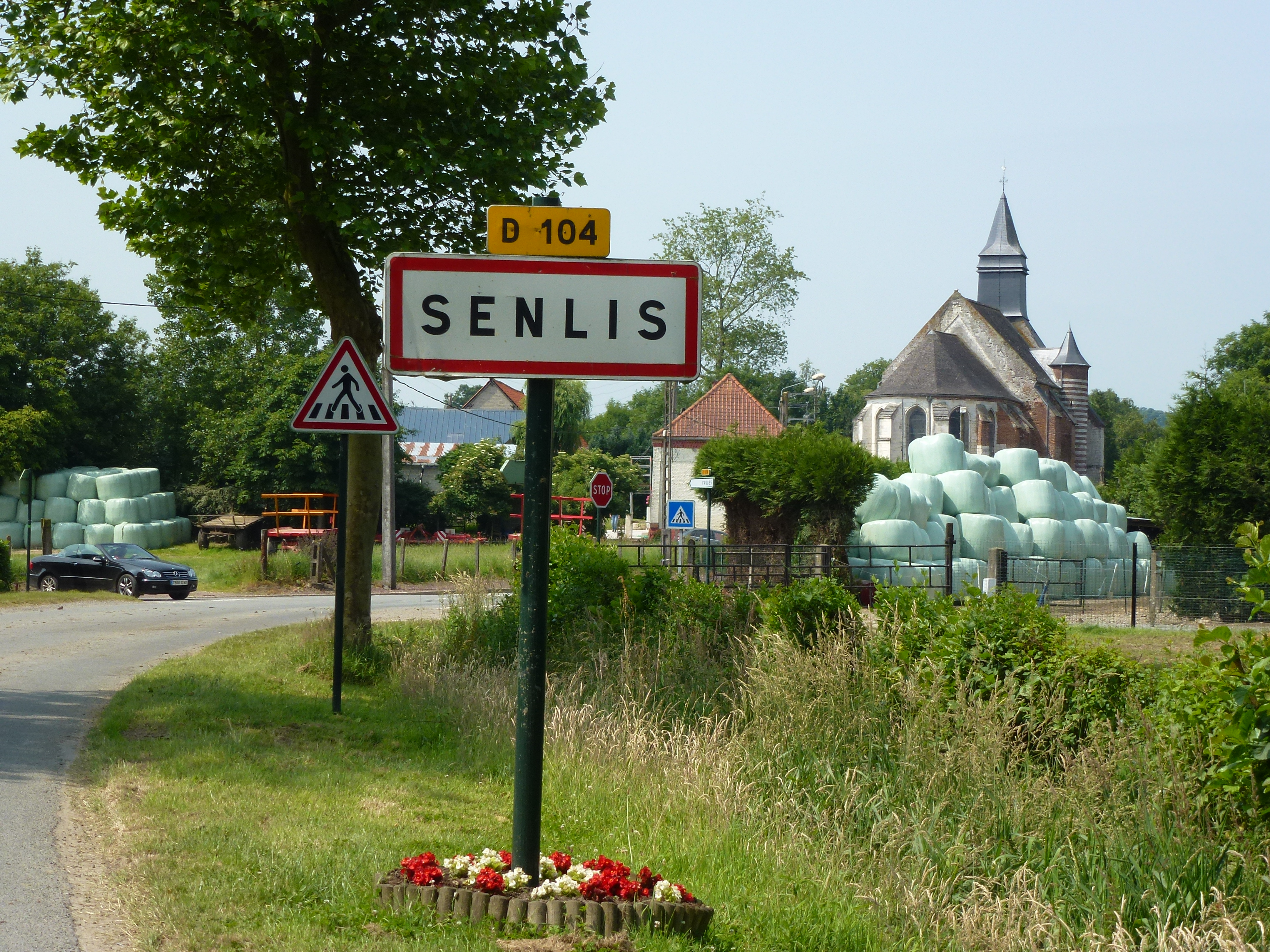 Senlis (Pas-de-Calais, Fr) panneau d'entrée Senlis et église Notre- Dame PA00108430 .